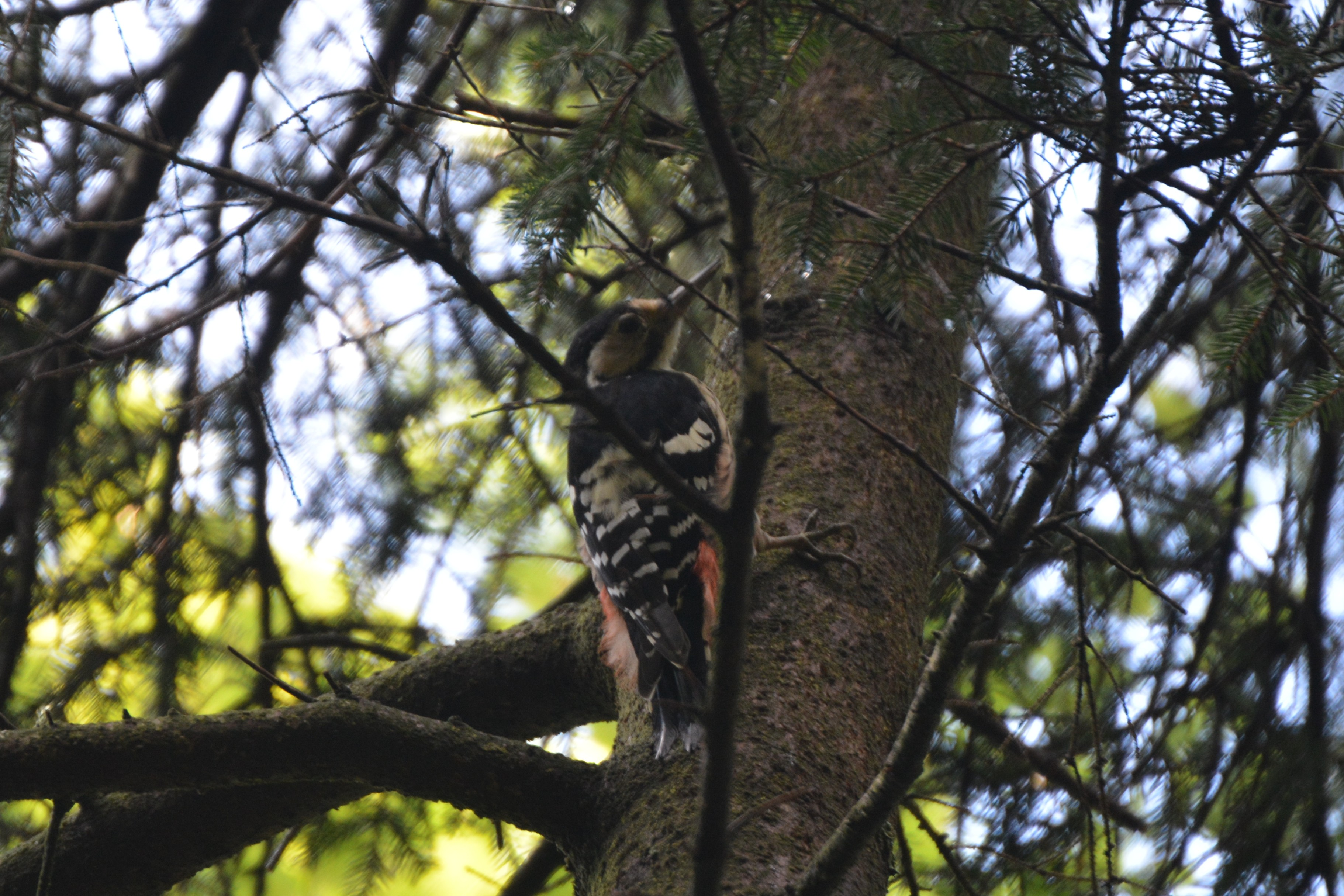 weiblicher Weißrückenspecht bei der Nahrungssuche